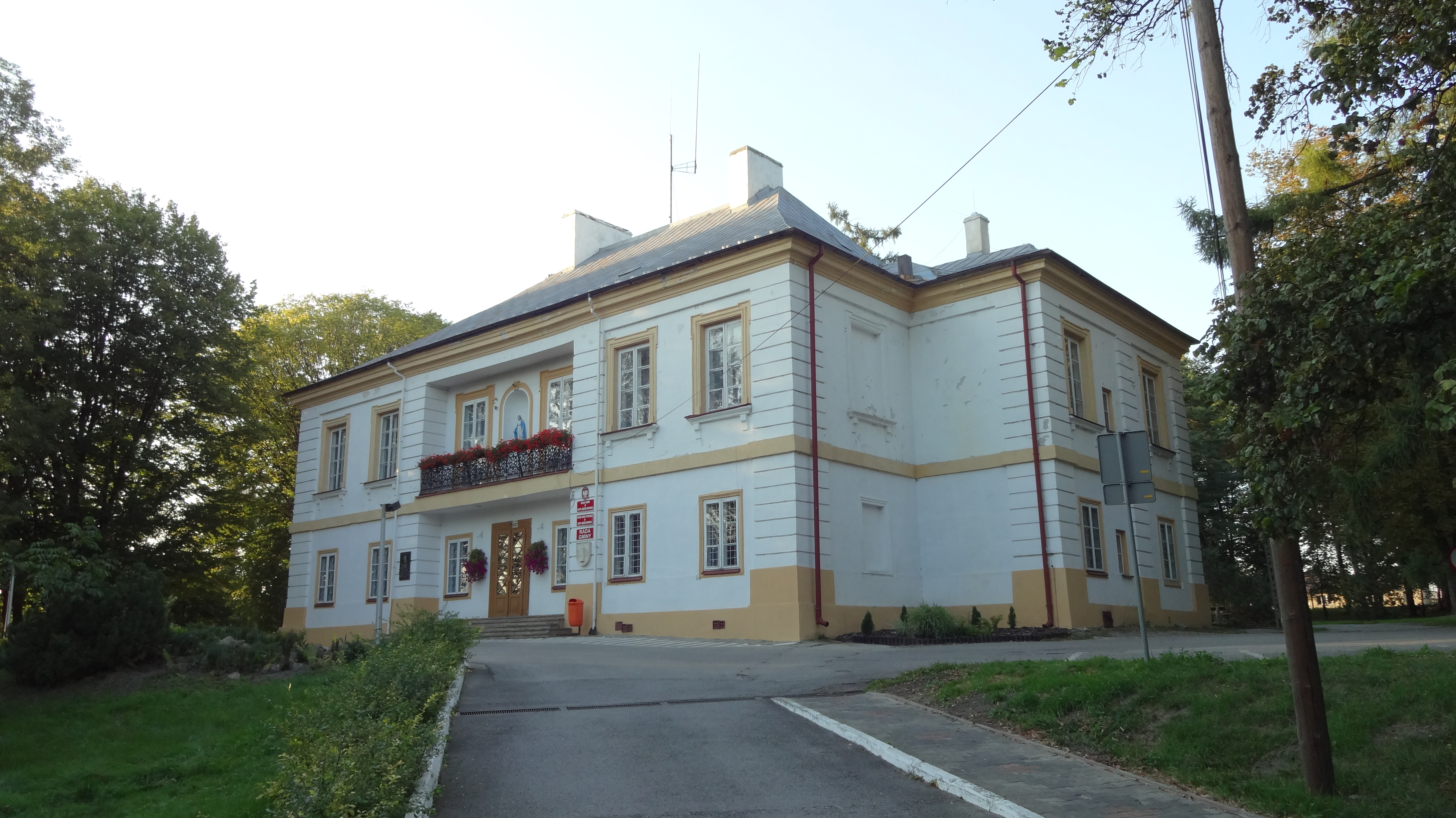 Zespół pałacowy: Pałac Park Słupia, Słupia 04.1947.